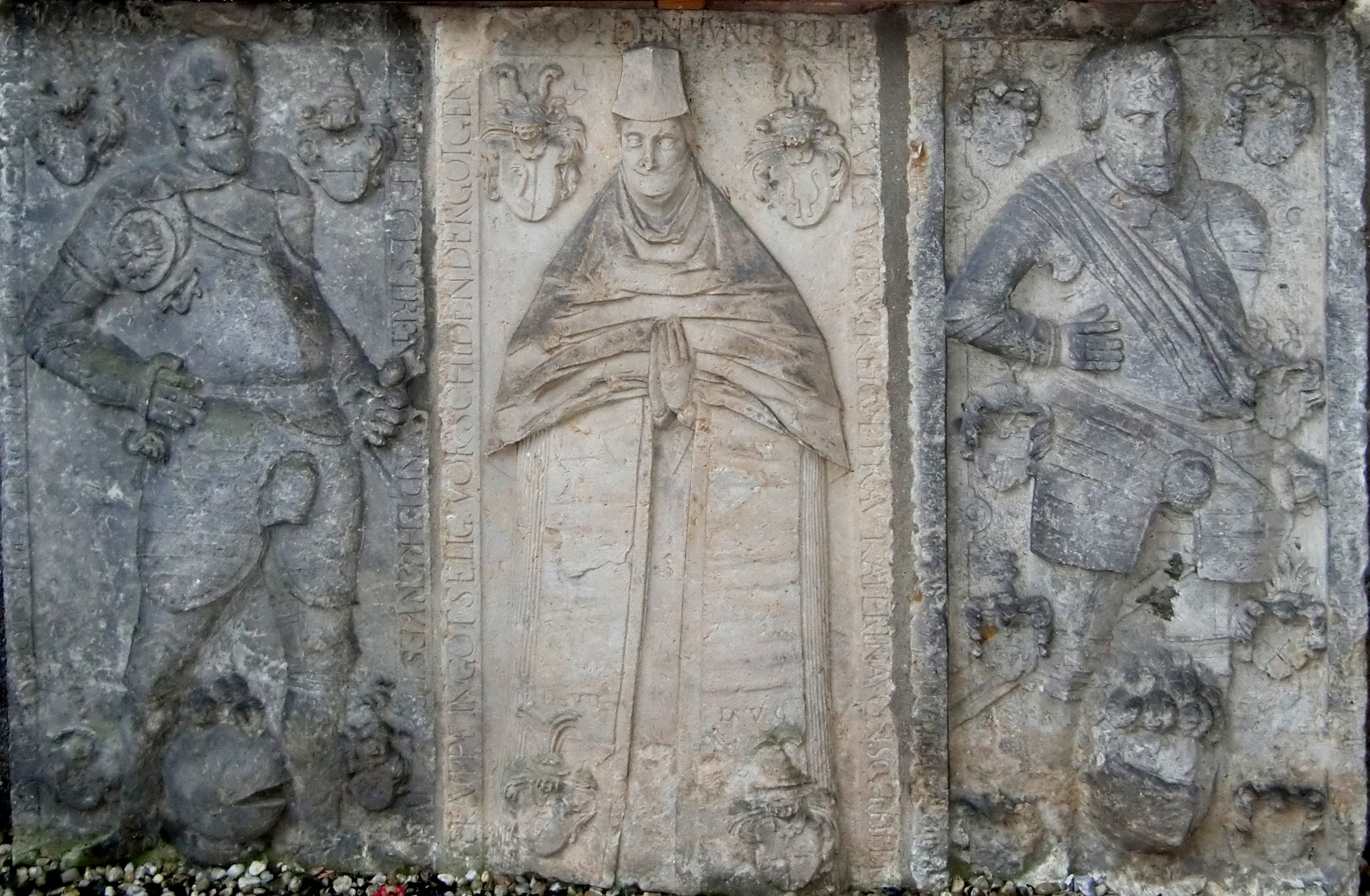 Kirche Milkel, Denkmal Heinrich von Gersdorf auf Kauppa 1602-1617, Katharina von Schreibersdorf auf Kauppa *?-1. Juni 1604, Joseph von Gersdorf auf Kauppa *?-12. November 1608